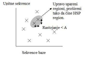 Pozicija egzaktnih pogodaka u BLAST-u.